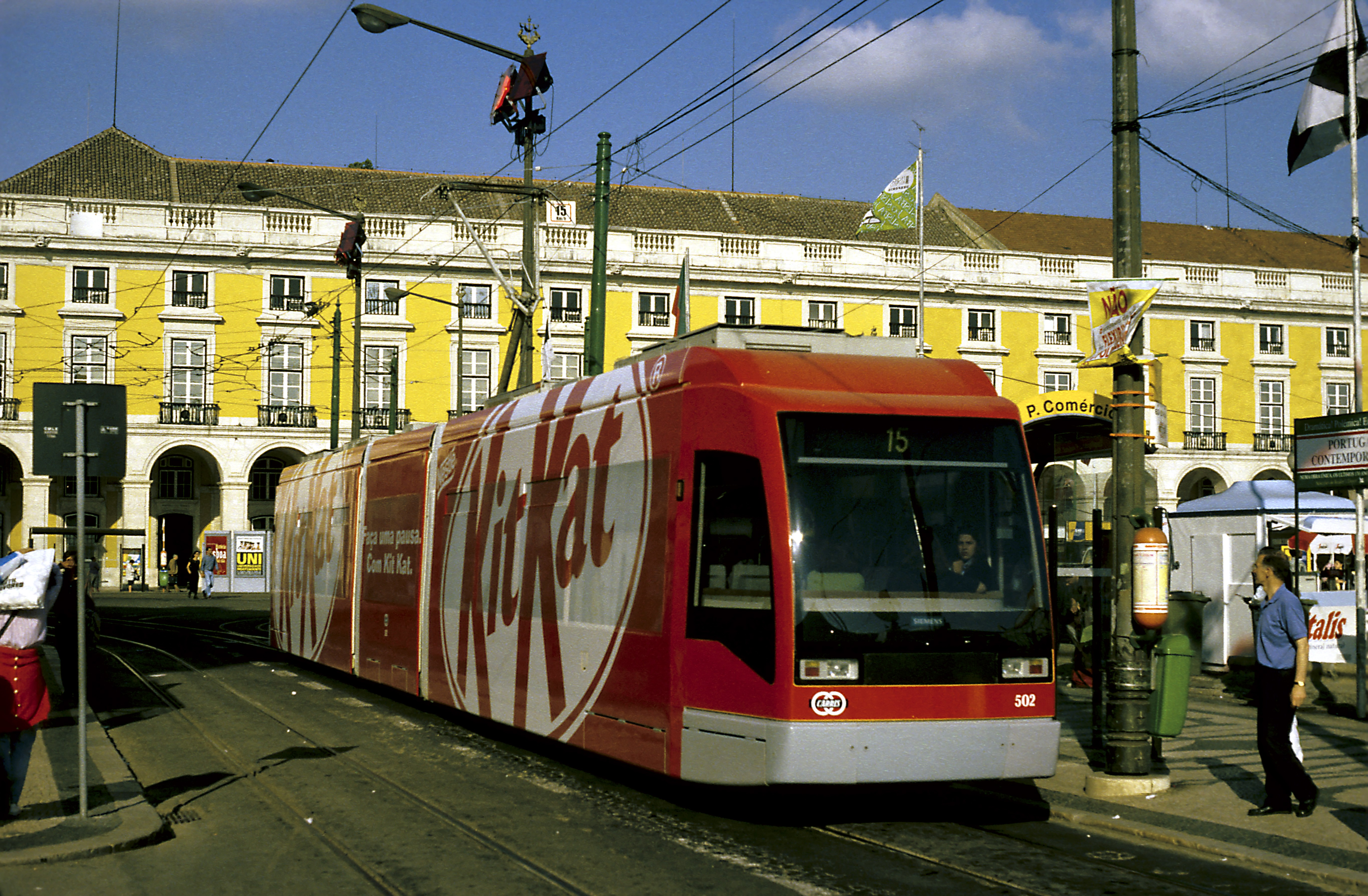 Zug der Linie 15 zur Praça da Figueira, Nachschuss. Carris scheint bei Vollwerbung und im Bezug auf die Meinung der Nutzer zu zugeklebten Fensterscheiben völlig schmerzfrei zu sein. Die Lage der Türen dürfen zusteigewillige Fahrgäste erraten. Bei der Metro Valencia, die diese Bauart als Reihe 3800 führt, bleiben die Fahrgäste von Werbung völlig verschont.